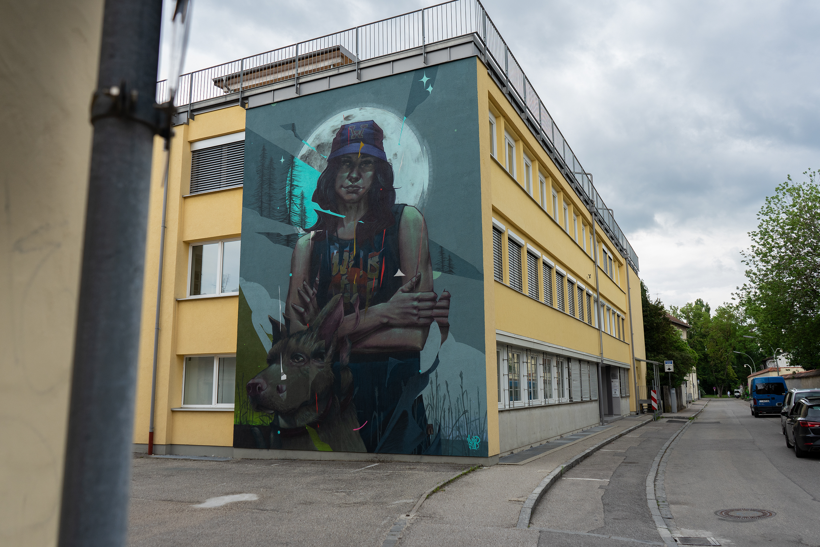 Wildlife - Fassadenbild von Mr. Woodland in Erding, das während des Festivals ARTDING entstand.